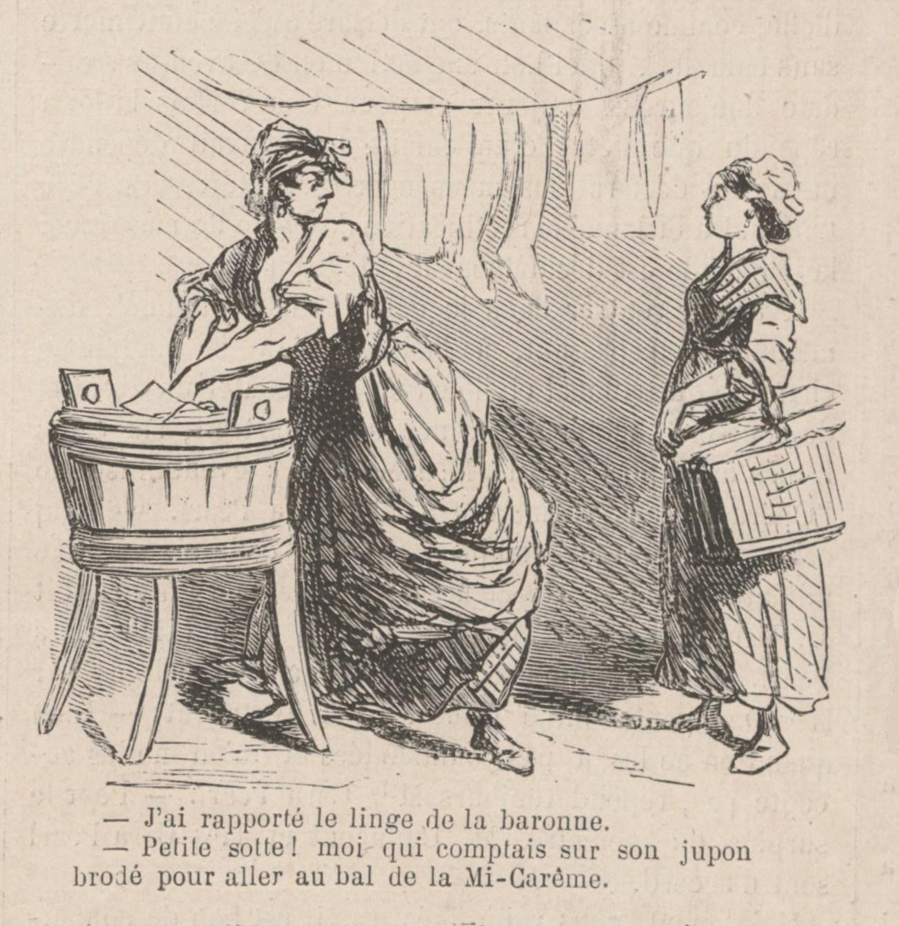 Caricature de Cham à propos de la Mi-Carême à Paris.